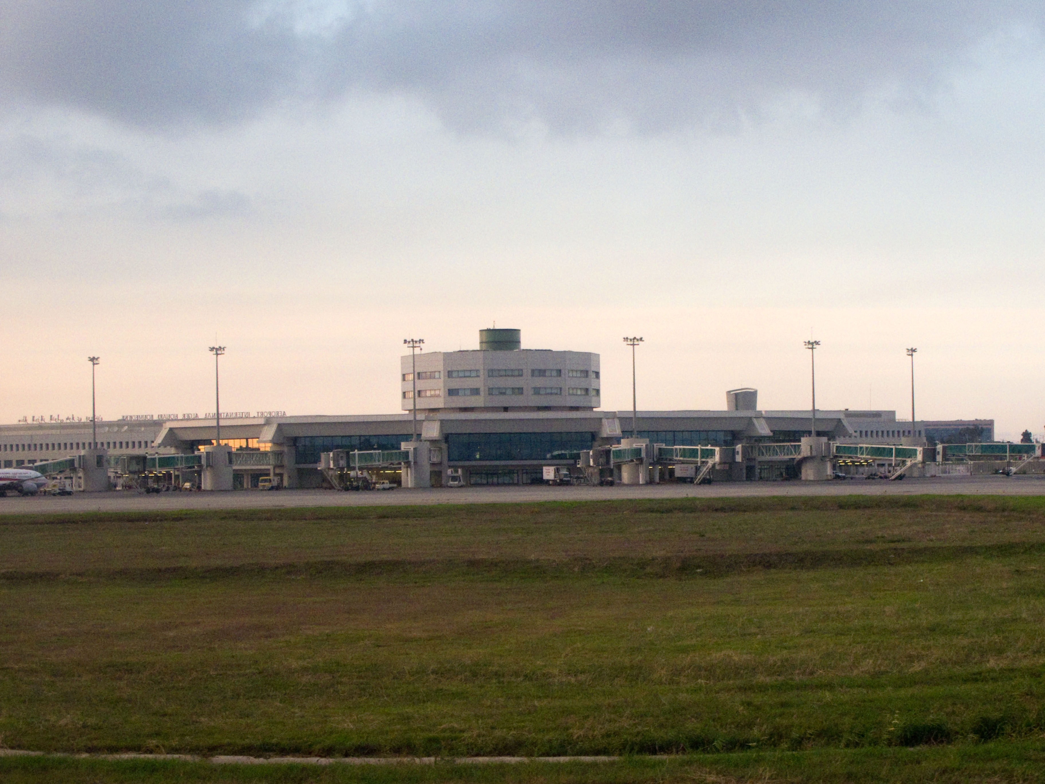 Aéroport Houari Boumediene, Dar El Beida, Alger, Algérie (nouvel aérogare, vue depuis les pistes)